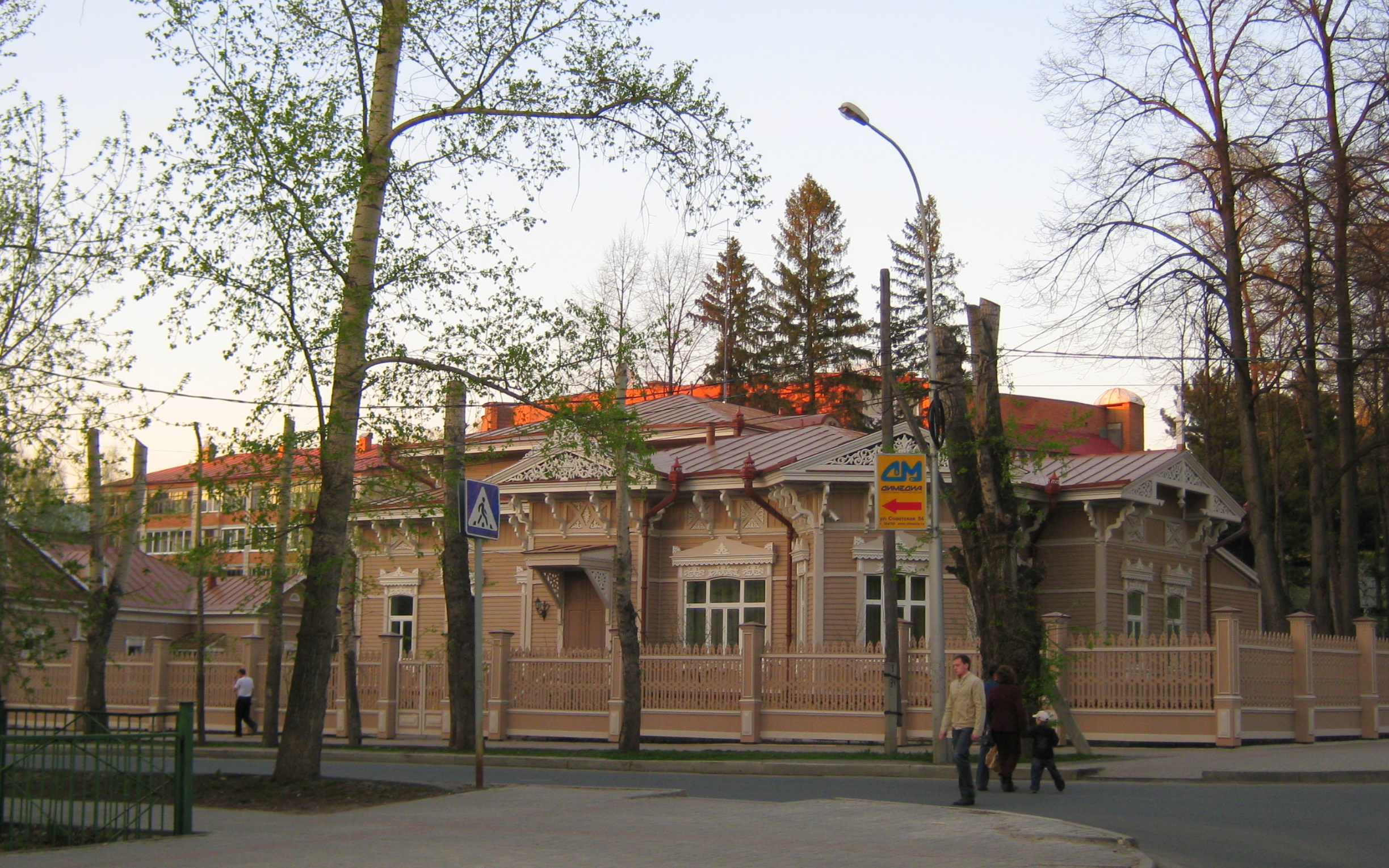 Дом приёмов областной администрации, бывший абортарий, ул. Белинского 72, Томск